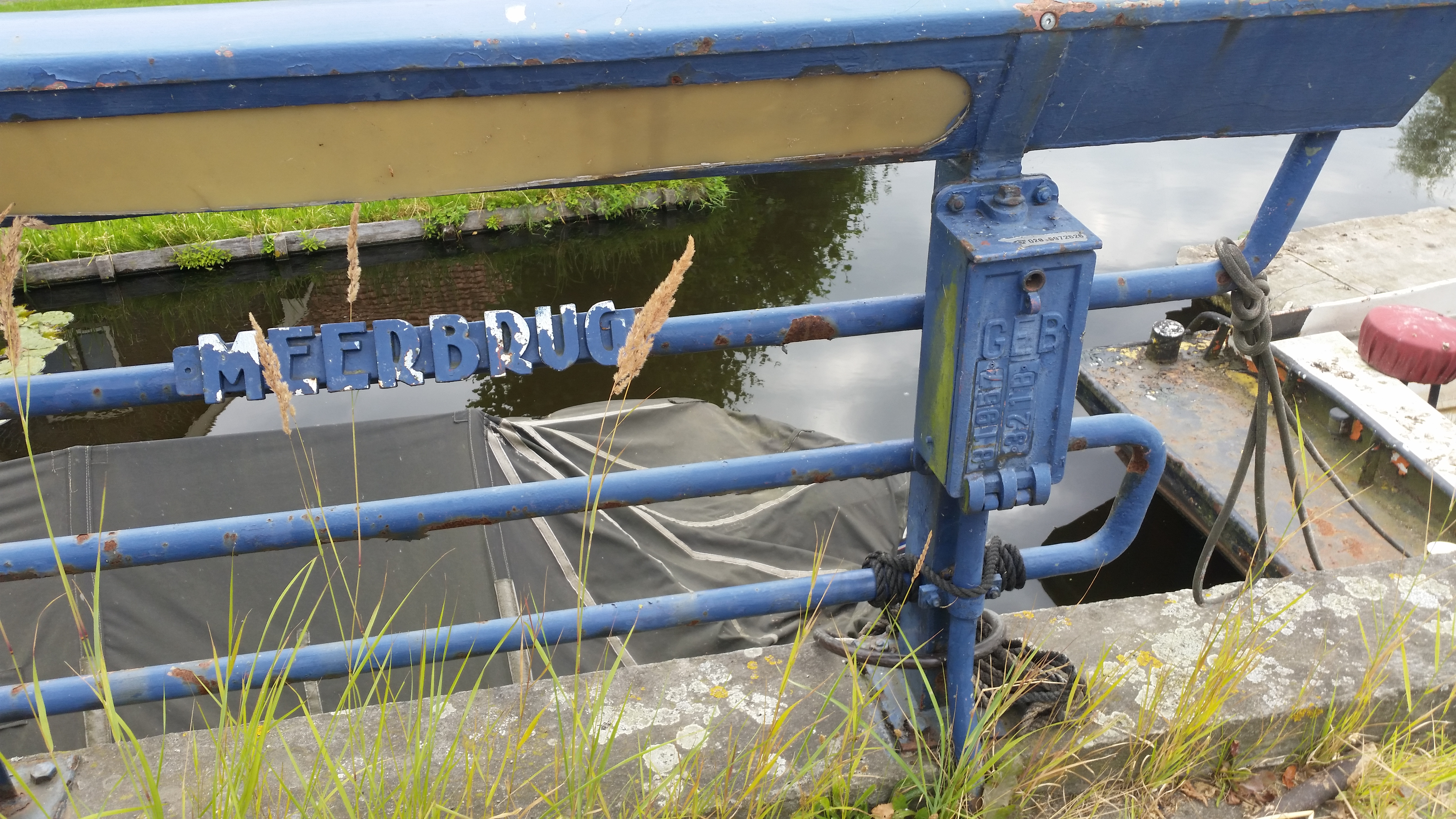 Brug 308, Meerbrug, leuning, GEB-kastje en naamplaat